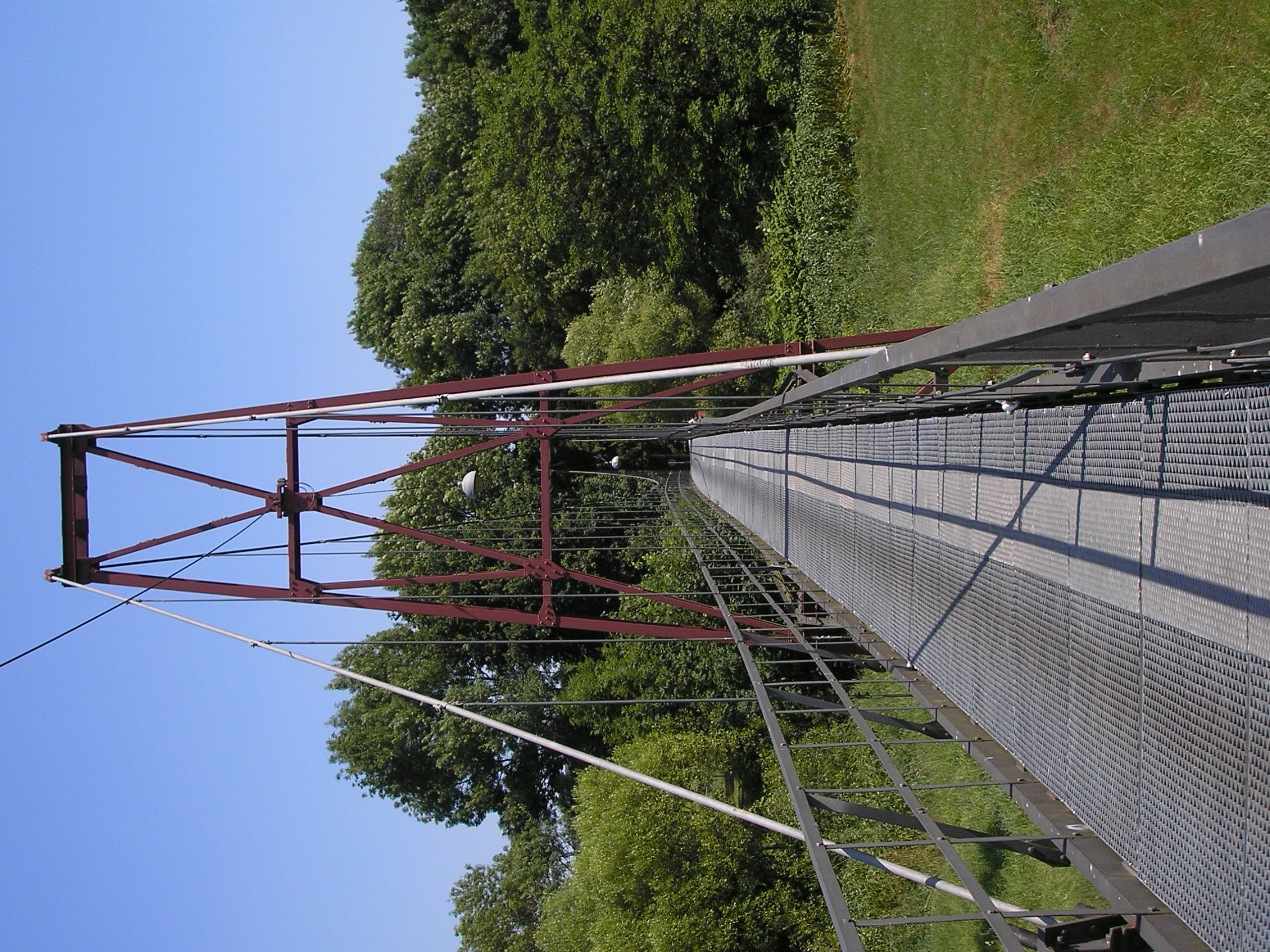 Fußgängerhängebrücke über die Sieg in Eitorf-Halfterfähre